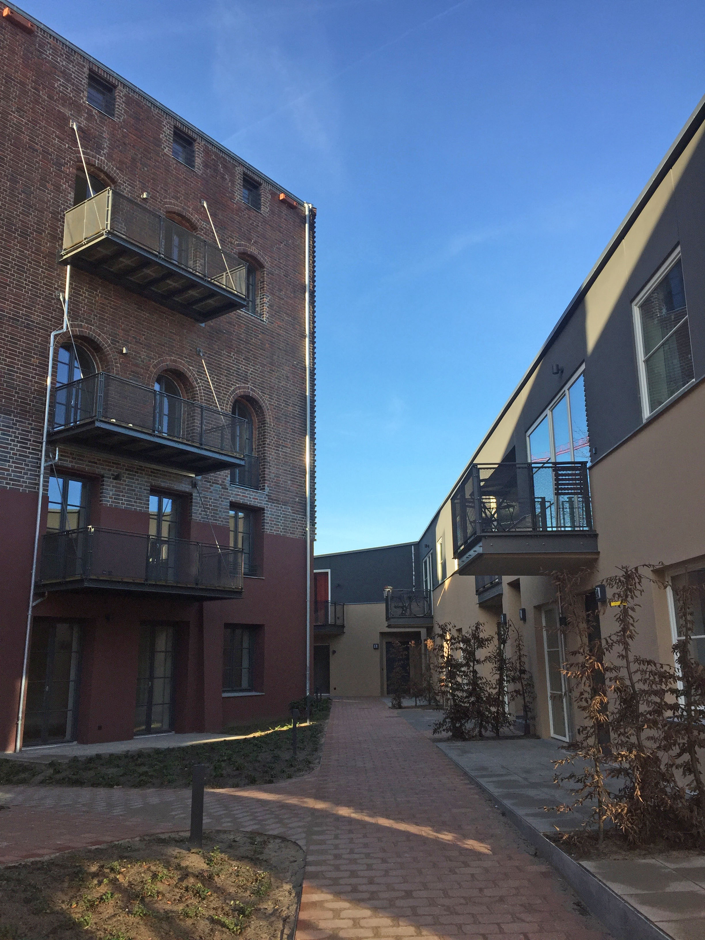 Potsdam, Albert-Einstein-Str. 1-7/Heinrich-Mann-Allee 1-3, ehem. Brauerei Gebr. Hoffmann am Brauhausberg. Innenhof.